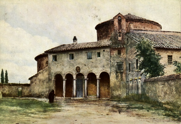 Santo Stefano Rotondo in Rome (rione Celio).